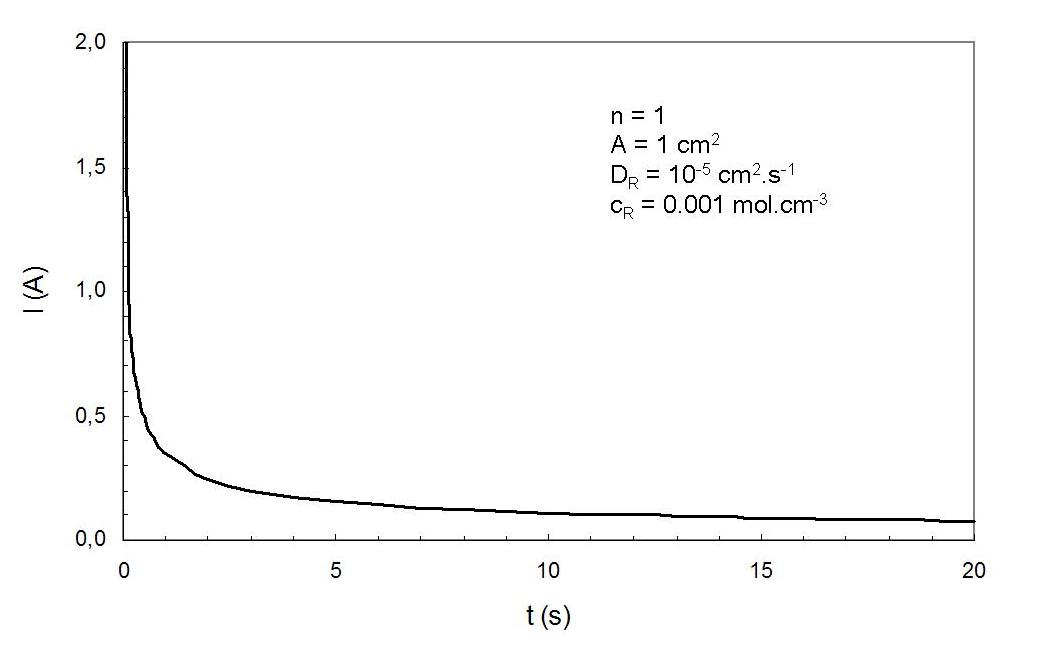 Variation de la densité de courant suivant l'équation de Cottrell